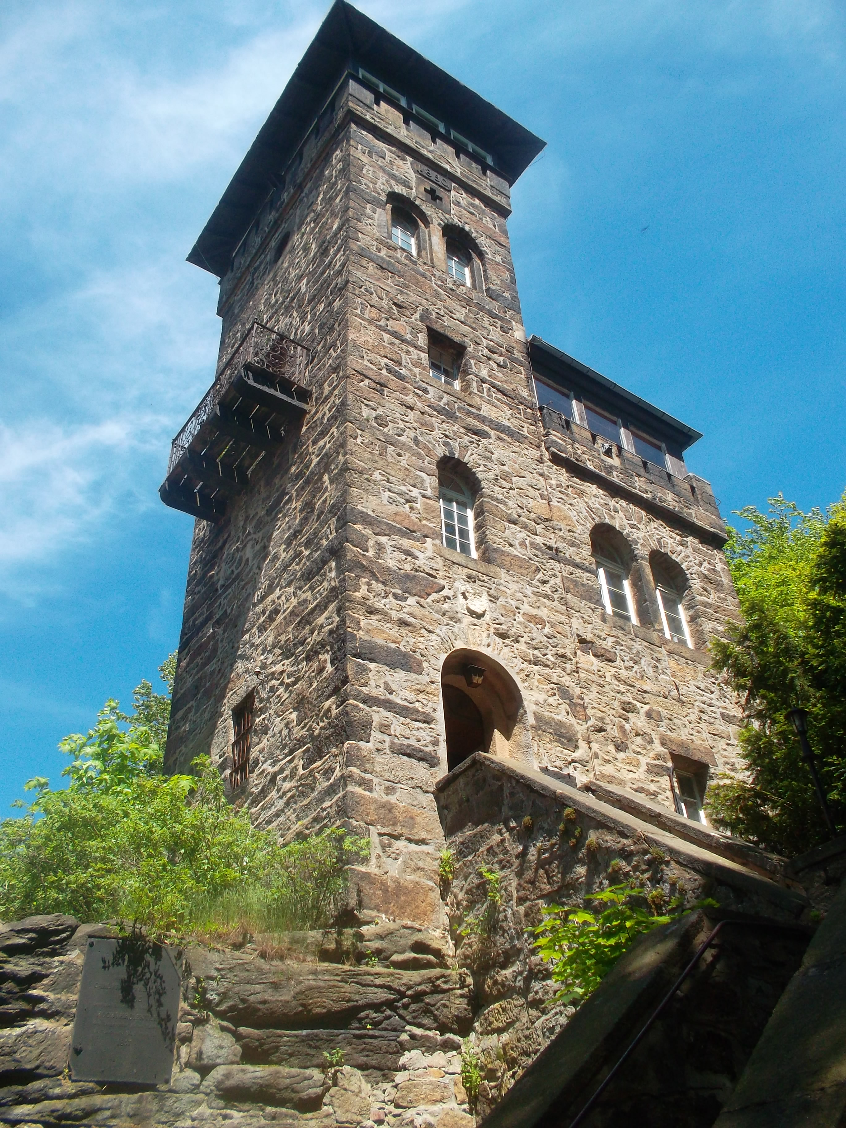 Der Aussichtsturm auf dem Czorneboh in Cunewalde Hornjoserbsce: Rozhladna wěža na Čornoboze